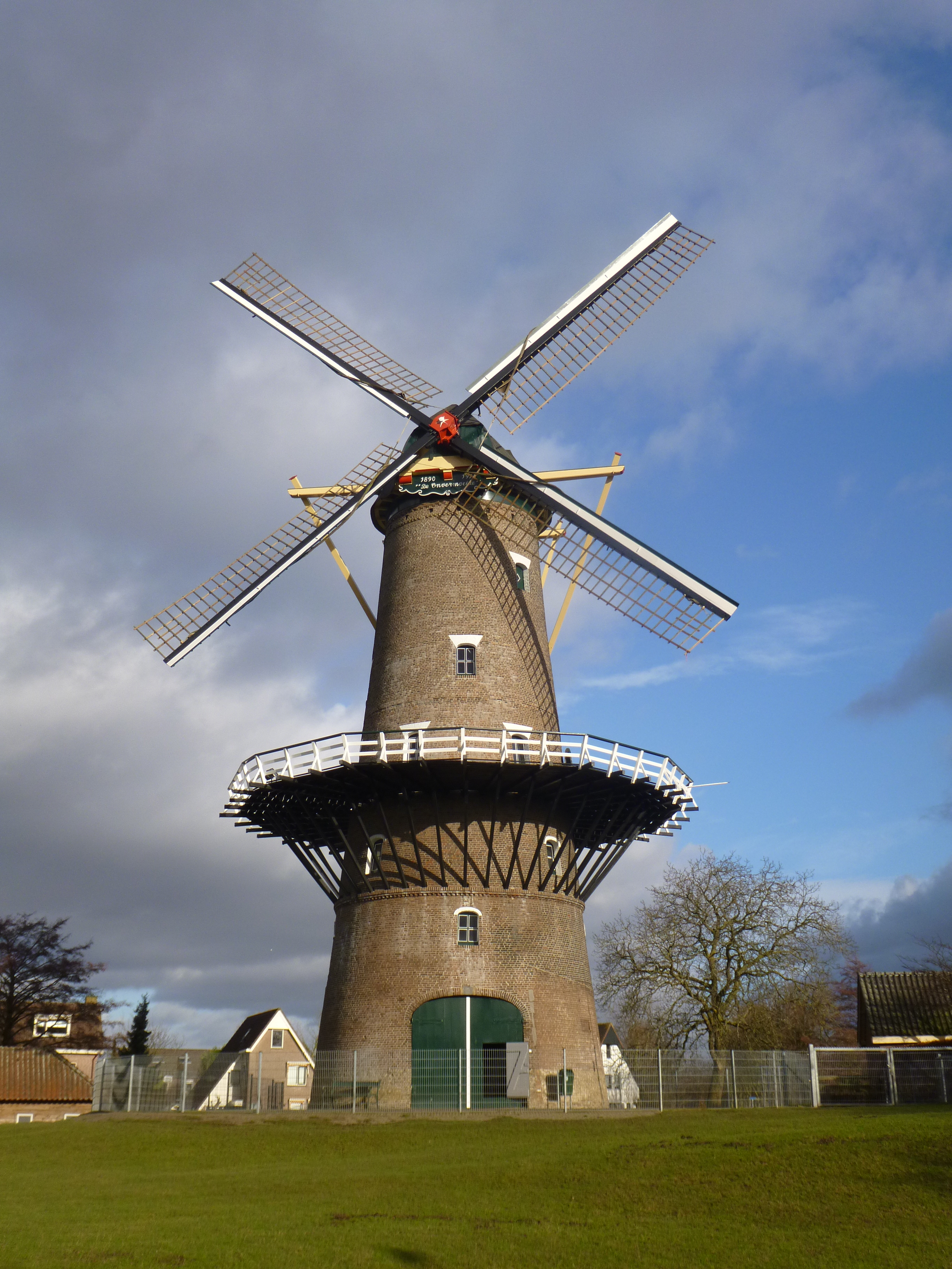 De Onvermoeide te Raamsdonksveer (Noord-Brabant)